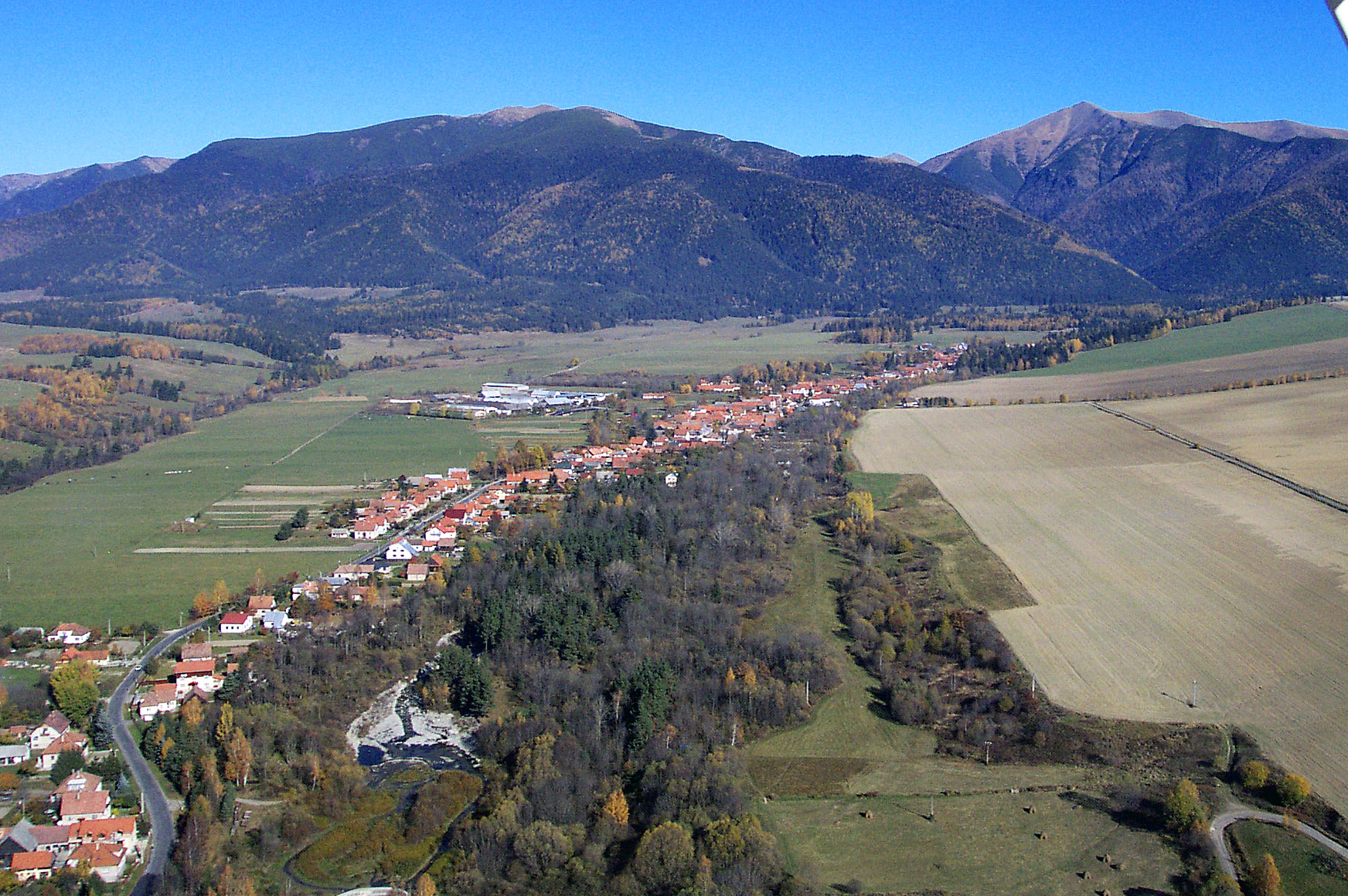 Pohľad na obec Smrečany a horským masívom Západné Tatry